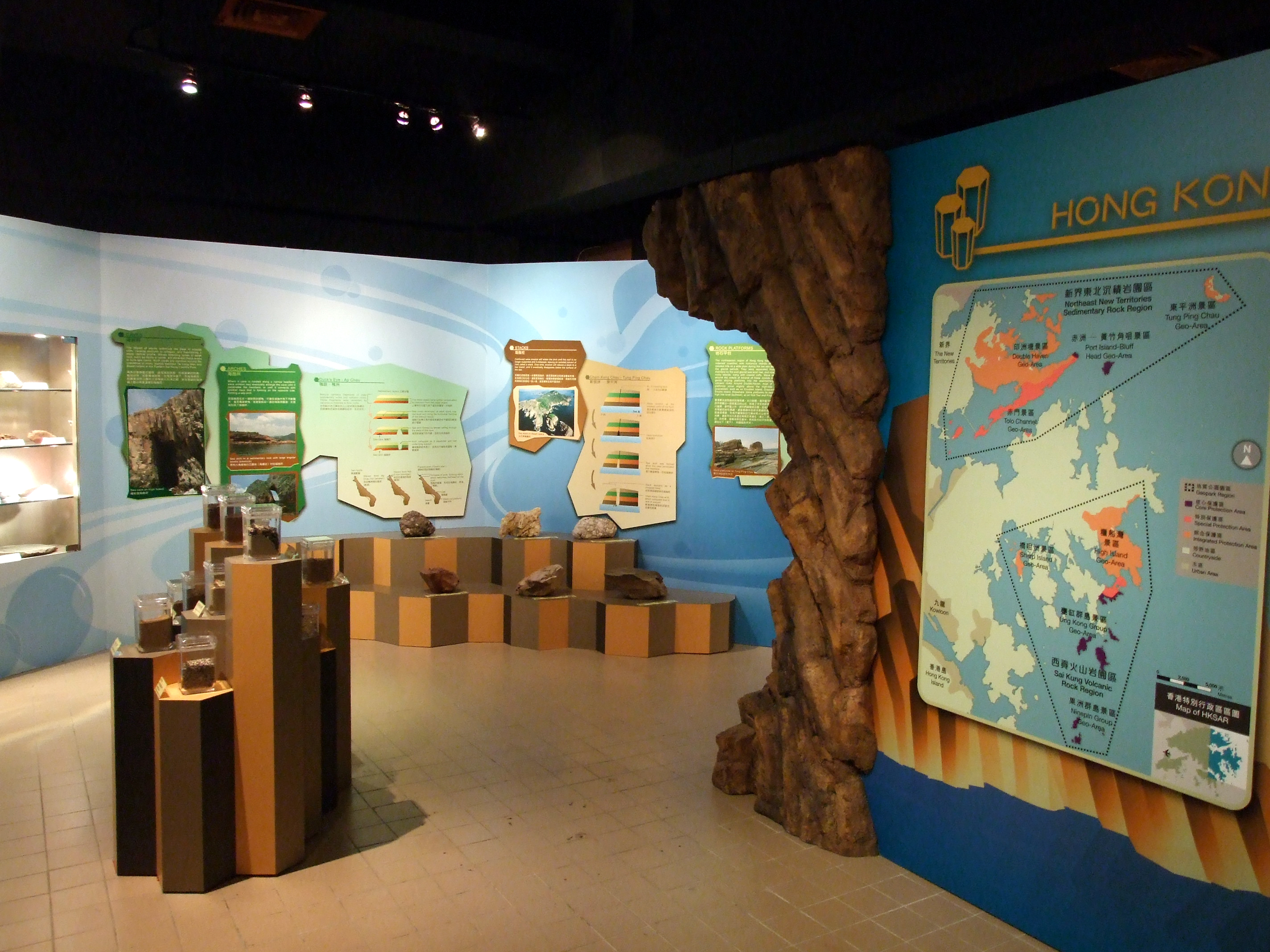 中文（香港）: 香港國家地質公園遊客中心